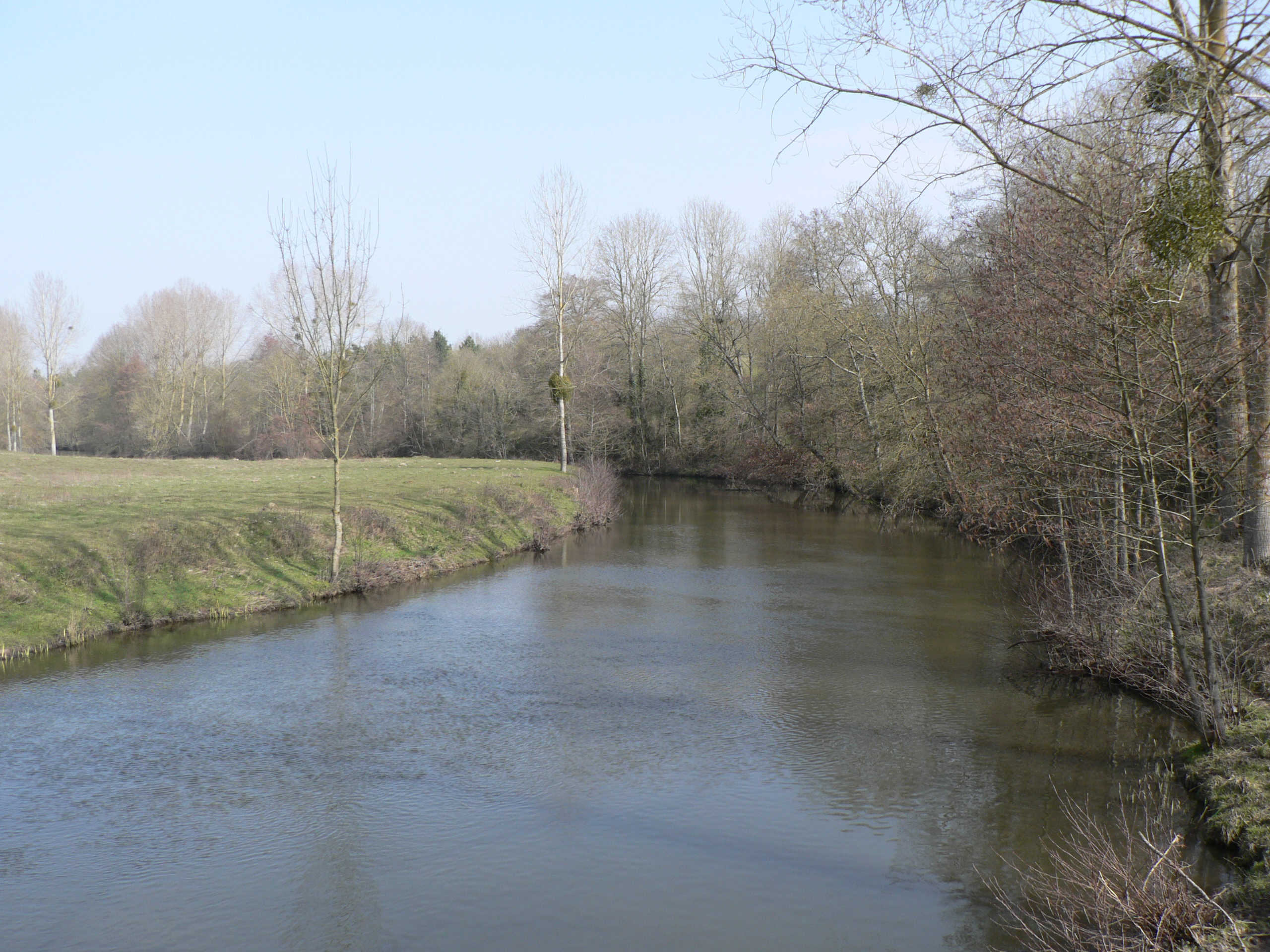 Le Thouaret vu du pont du moulin à Glenay (79)